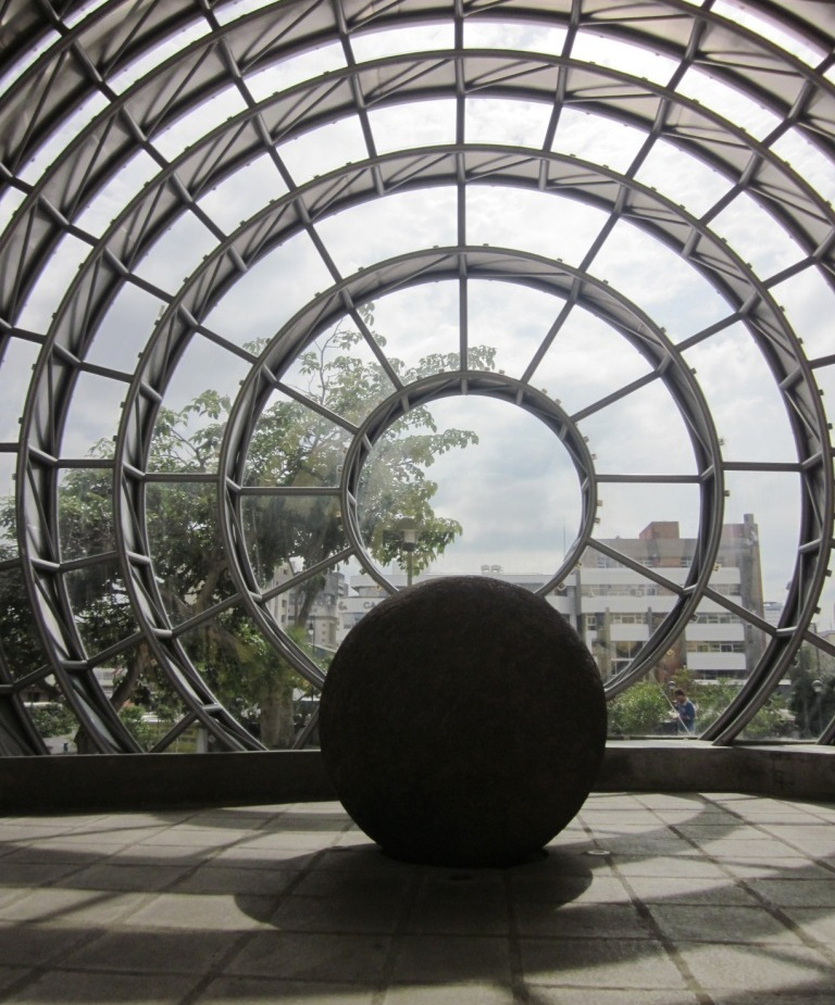 Esfera de piedra precolombina dentro de otra esfera de vidrio y acero inoxidable ubicada en la entrada del Museo Nacional de Costa Rica, como símbolo permanente de la identidad nacional.